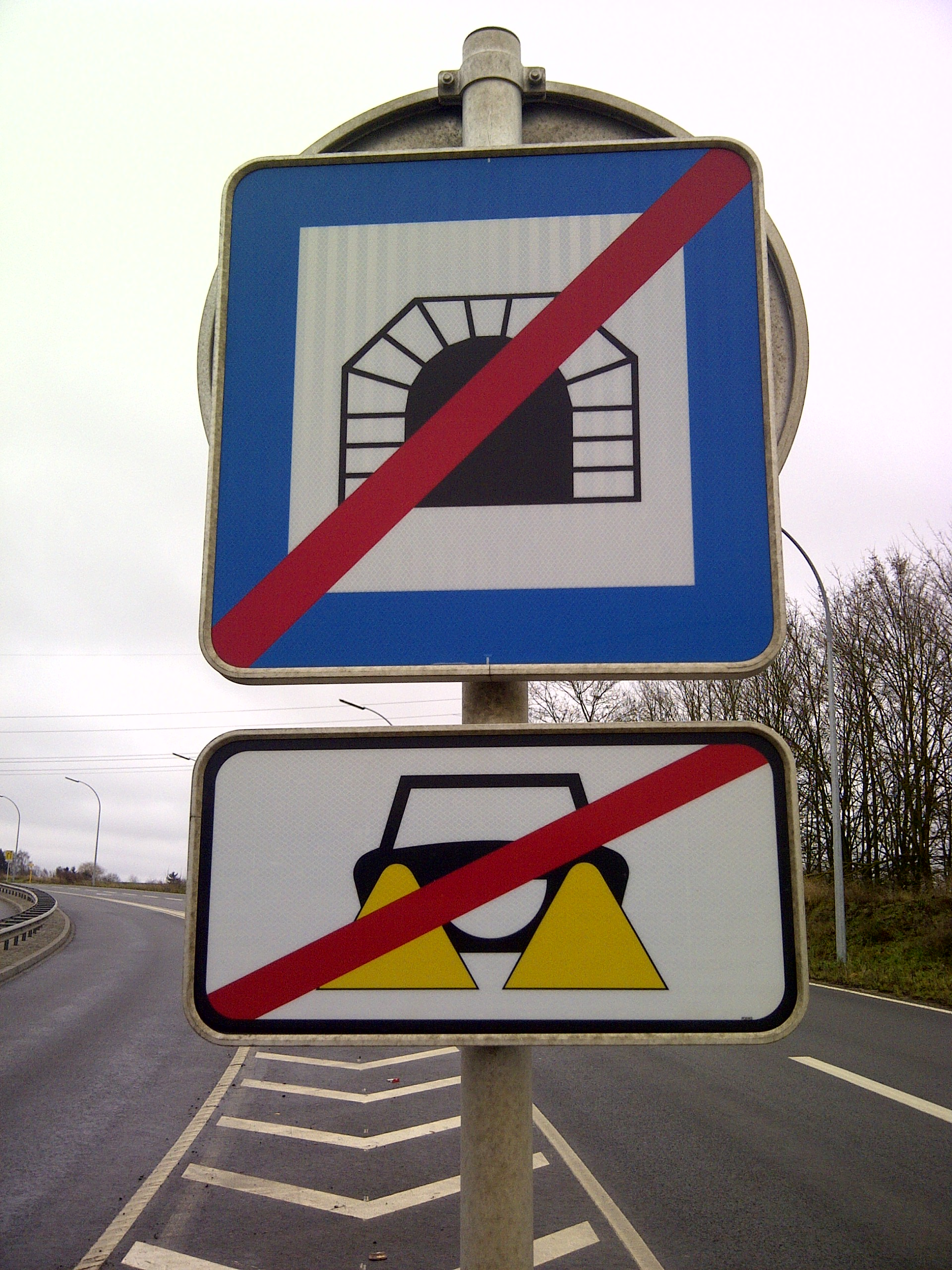 Verkéiersschëld E,28b "Enn vum Tunnel" aus dem lëtzebuerger Code de la Route.